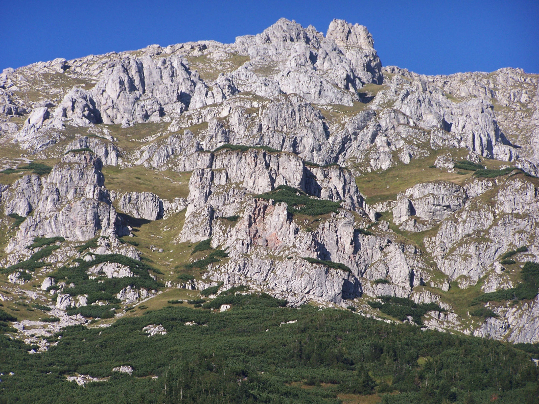 Rzędy Tomanowe (Tatra Mountains, Ciemniak)